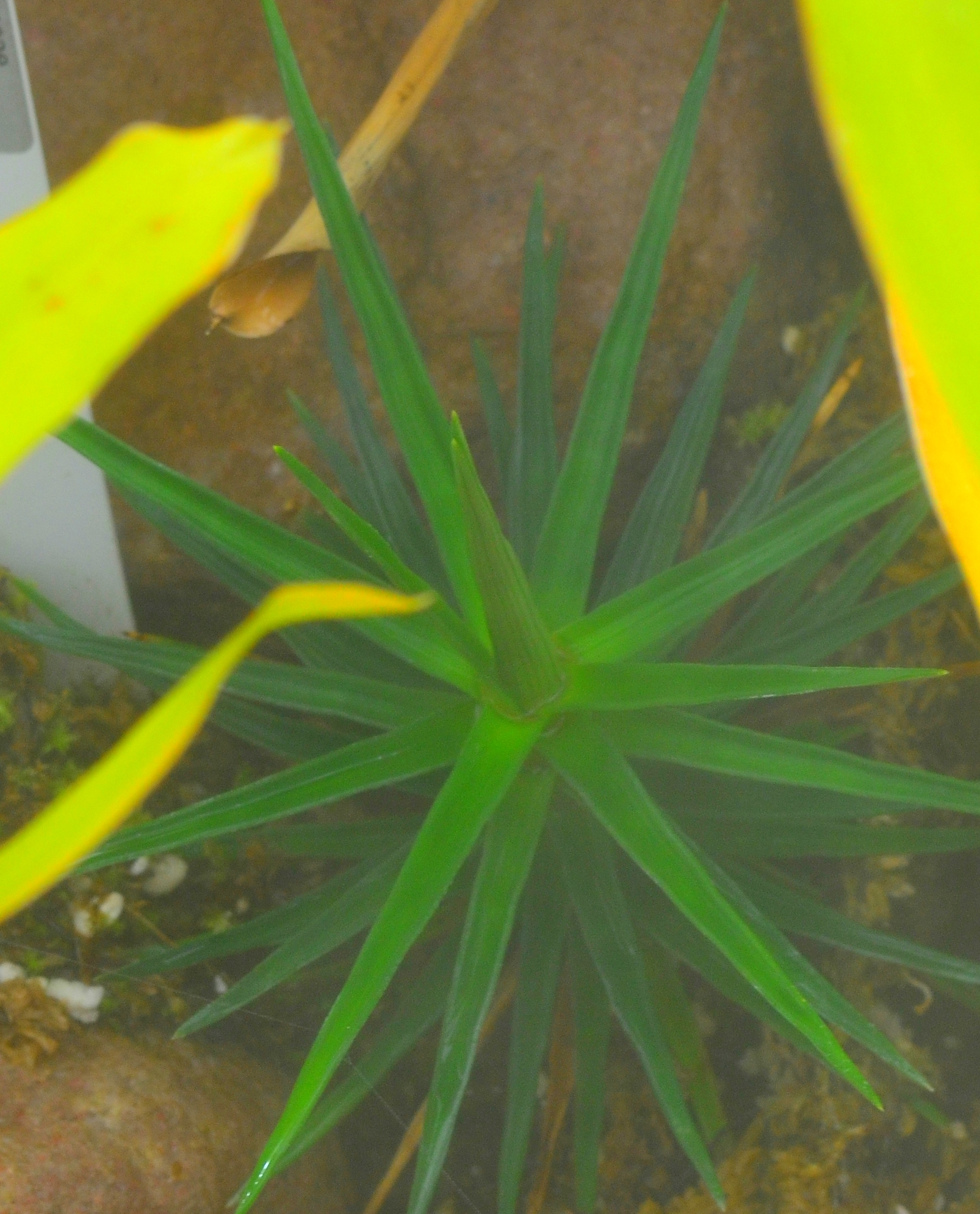 Spécimen de Ayensua uaipanensis, cultivé dans les serres du jardin botanique de Lyon au parc de la Tête-d'Or